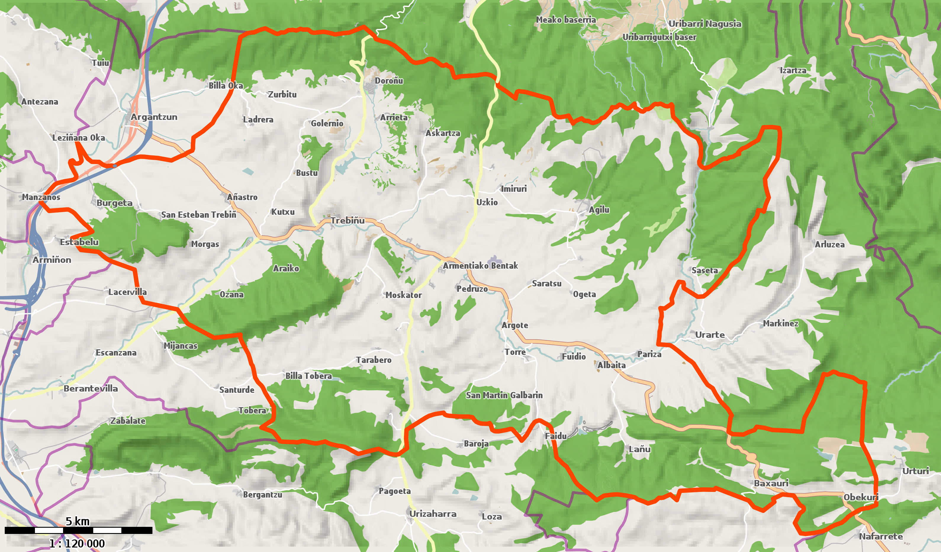 Trebiñu udalerria OSM 2016